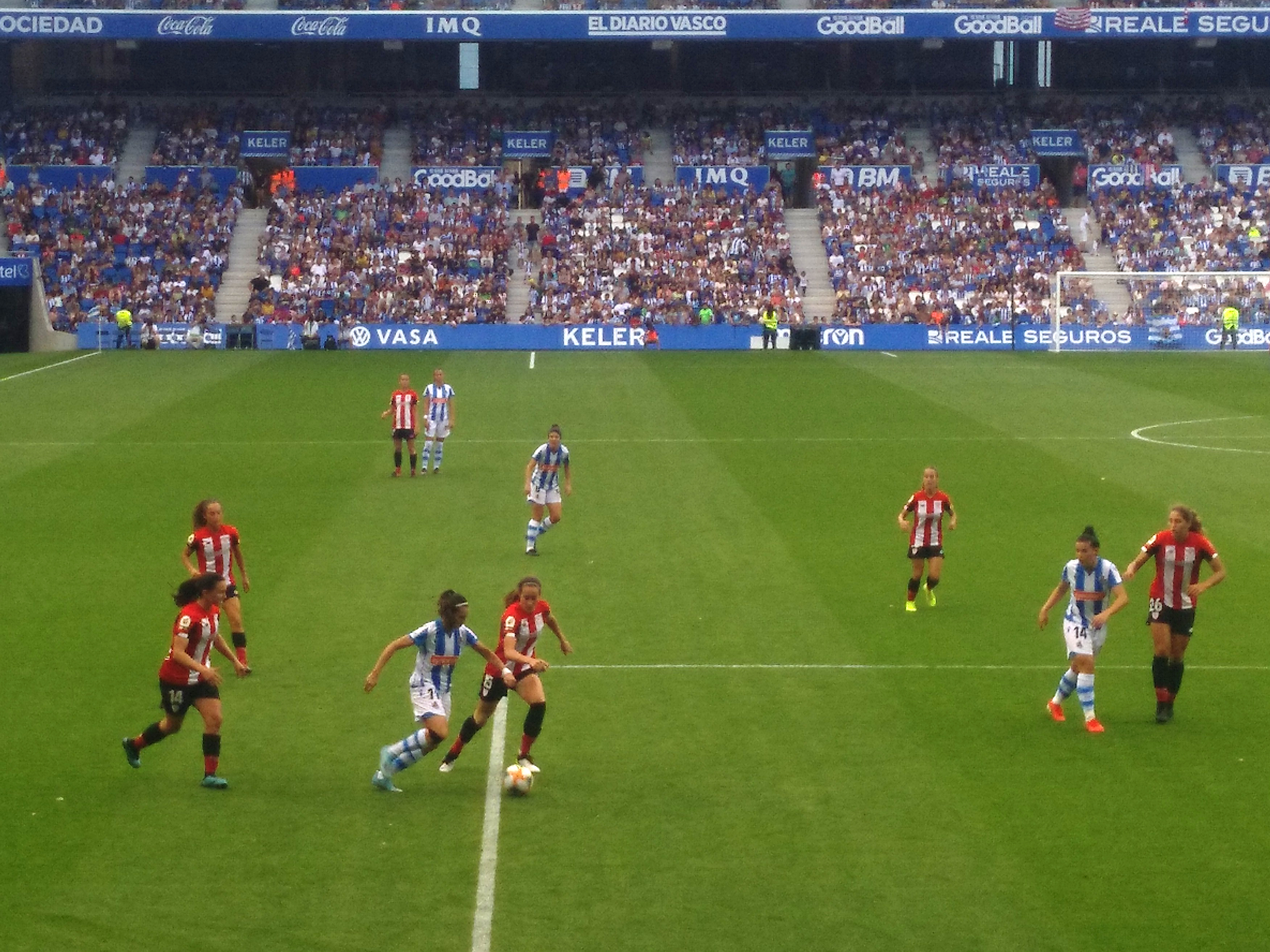 Emakumezkoen euskal derbia 2019-X-13. Asistentzia errekorra Anoetan 28.367. Erreala 0-2 Athletic